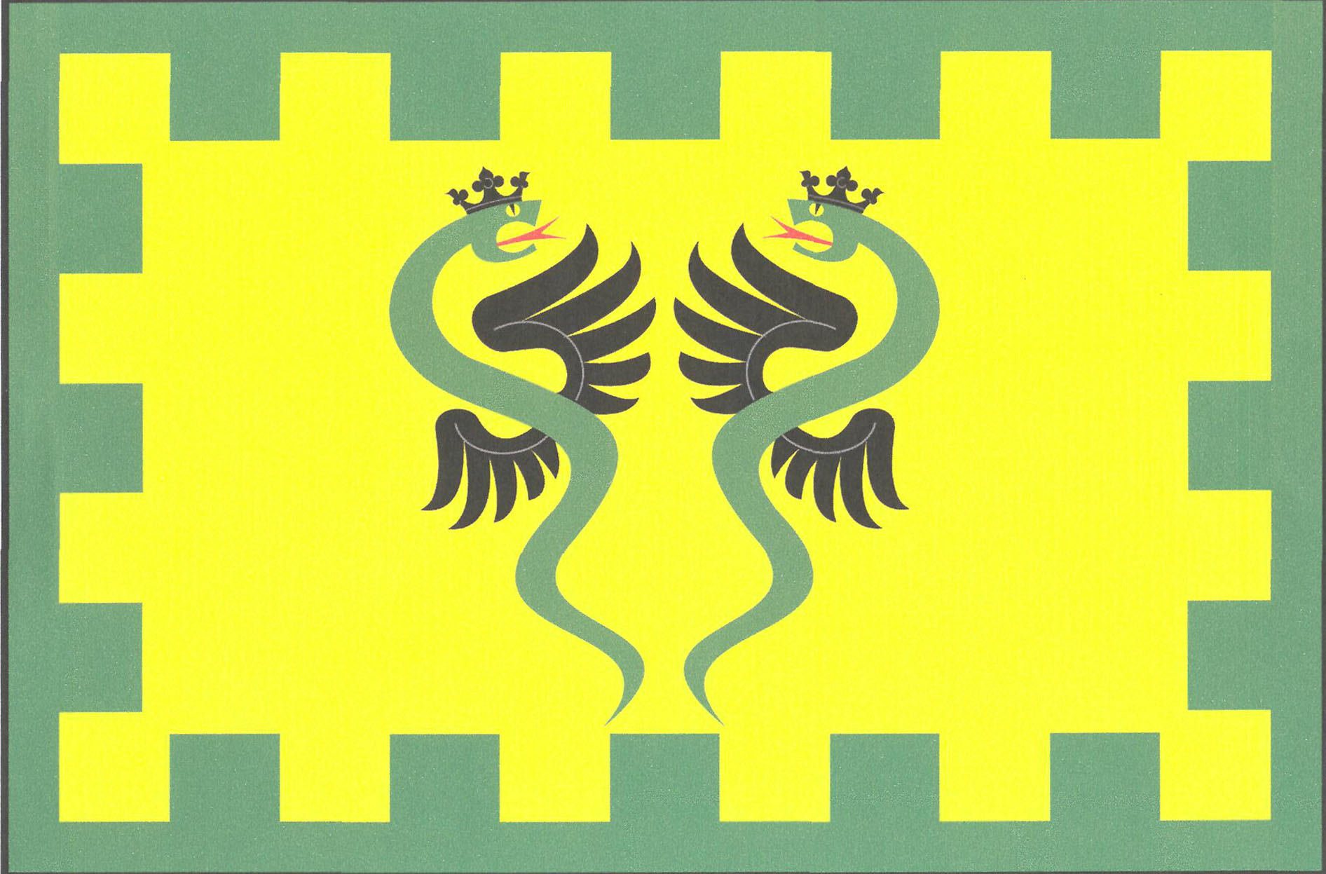 Vlajka obce Plazy